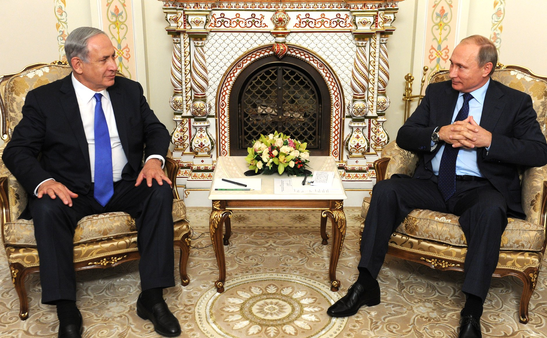 Встреча Президента России Владимира Путина с Премьер-министром Израиля Биньямином Нетаньяху